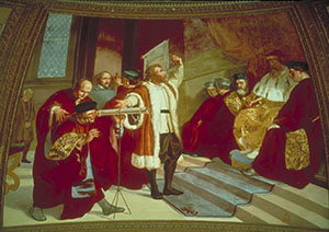 Galileo presenta il telescopio al Senato veneziano radunato sul campanile di S. Marco a Venezia, affresco di Luigi Sabatelli, Tribuna di Galileo, Firenze